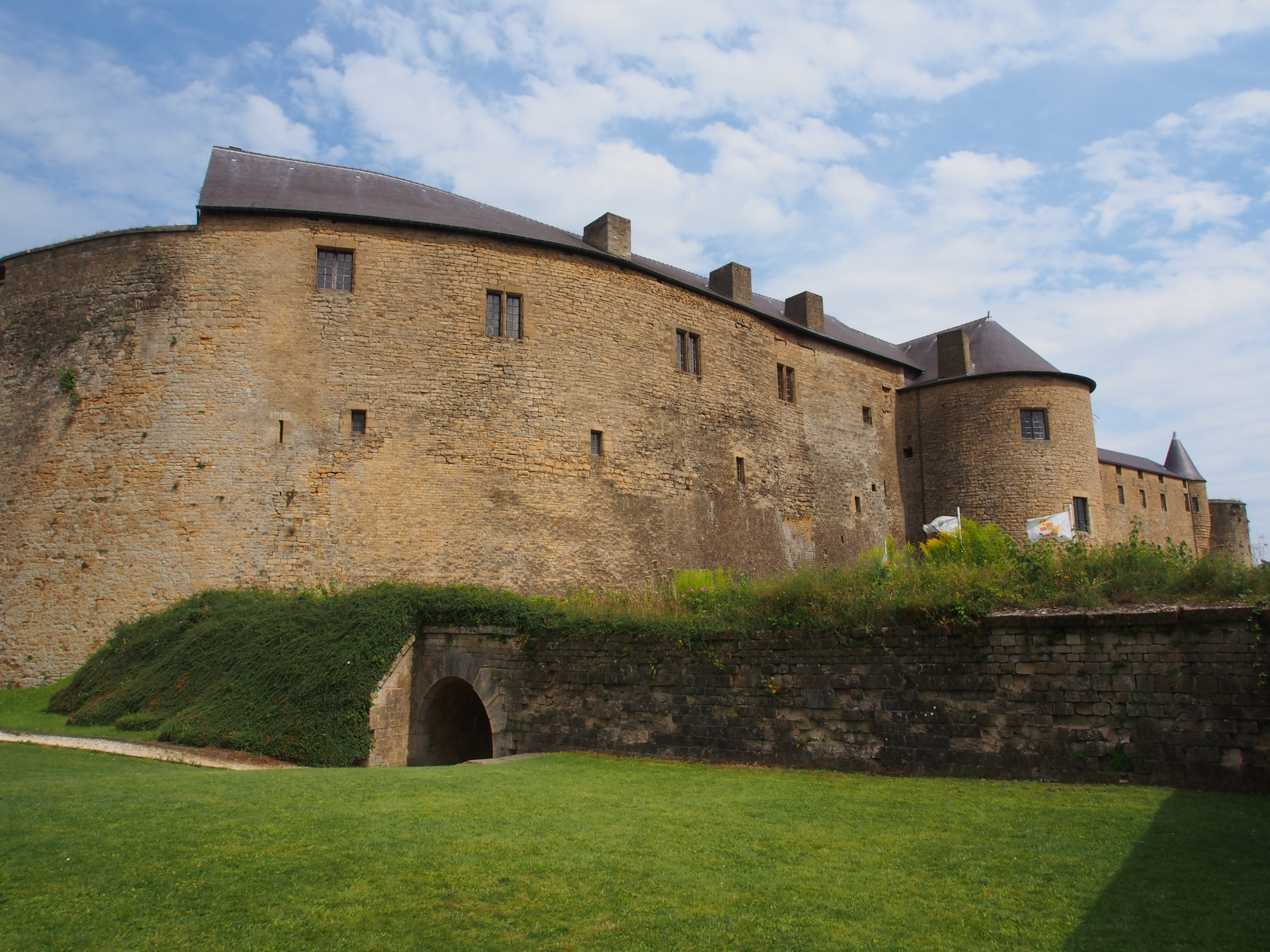 Château de Sedan